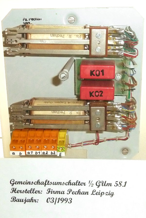 Als Gemeinschaftsumschalter (GUm) wird ein Gerät zur Mehrfachnutzung einer Amtsleitung mit in der Regel zwei Rufnummern (Zweieranschluss, Mehrfachanschluss oder Gemeinschaftsanschluss) bezeichnet. Er schaltet den Amtsanruf auf das der jeweiligen Rufnummer zugeordnete Telefon. Ebenso schaltet er das Telefon an die Amtsleitung zur Vermittlungsstelle, sobald der Gabelumschalter des Telefonapparates betätigt (Telefonhörer abgenommen) wird. Das jeweils zweite Telefon am dem Umschalter kann währende dieser Verbindungszeit nicht benutzt werden, es ist inaktiv. Das Gesprächsgeheimnis bleibt immer gewahrt, der zweite Teilnehmer kann auf keinen Fall mithören. Die Gemeinschaftsumschalter wurden von der Vermittlungsstelle gespeist, sie benötigten deshalb keine eigene Stromversorgung. In der Relaistechnik gab es die Umschalter als Beikasten und als elektronische Baugruppe im Telefon.